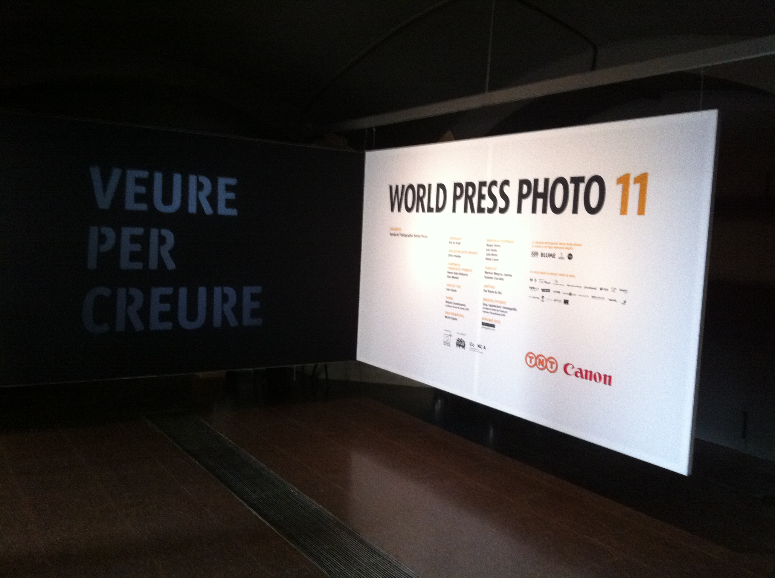 World Press Photo CCCB 2011